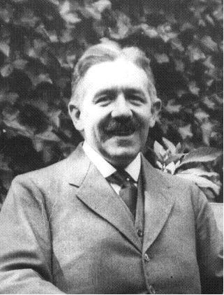 Fotografie von Professor Dr. med. Georg Strube (1869–1932) in seinem Garten in Bremen, 1929 aufgenommen